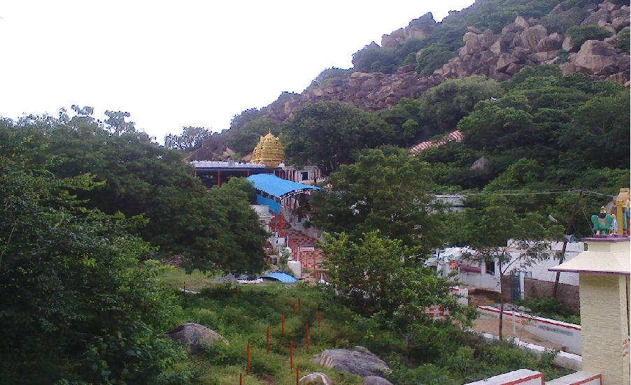 కురుమూర్తిస్వామి దేవాలయం